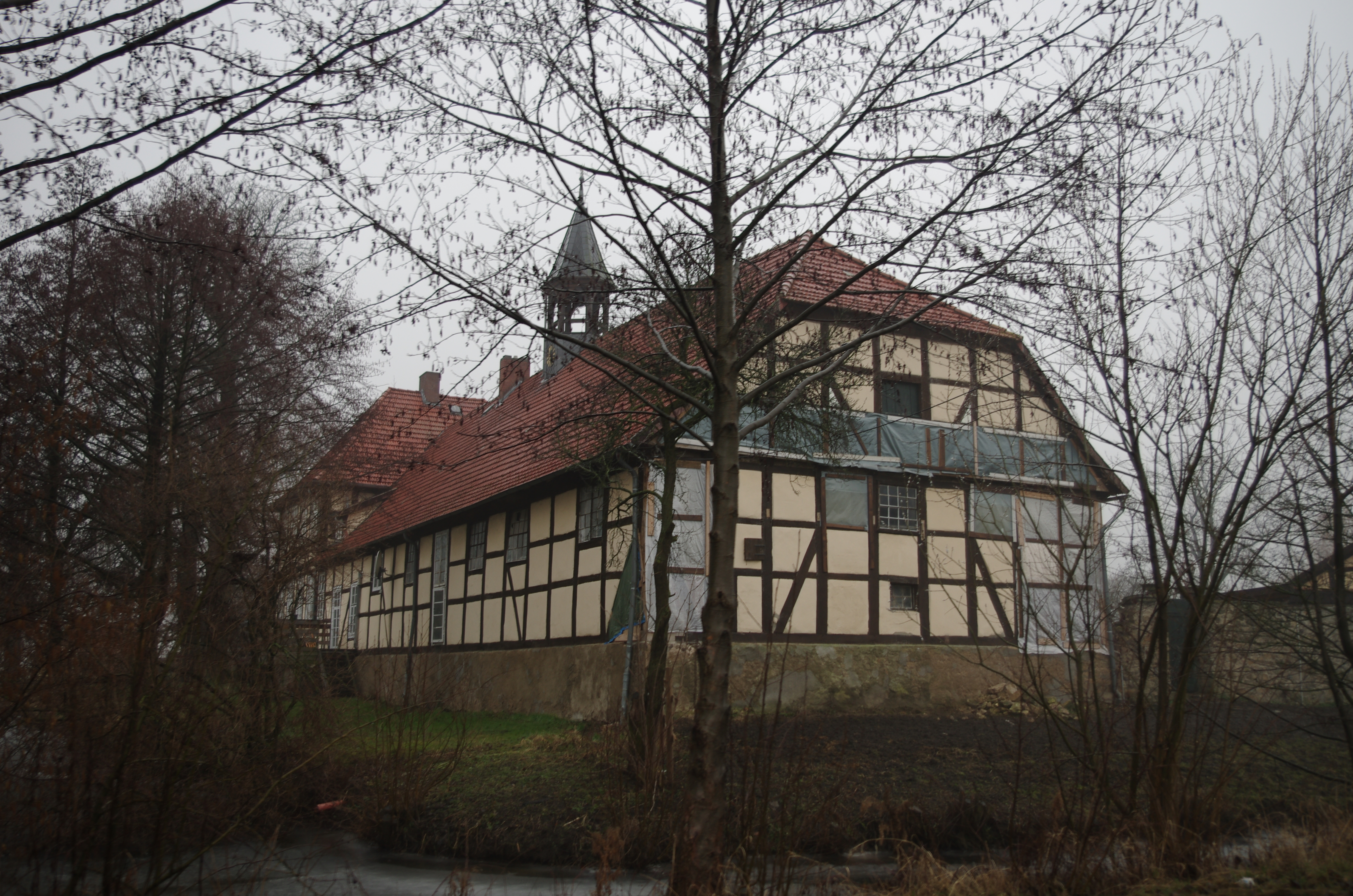 Ronnenberg, Region Hannover in Niedersachsen. Das Gut steht unter Denkmalschutz.